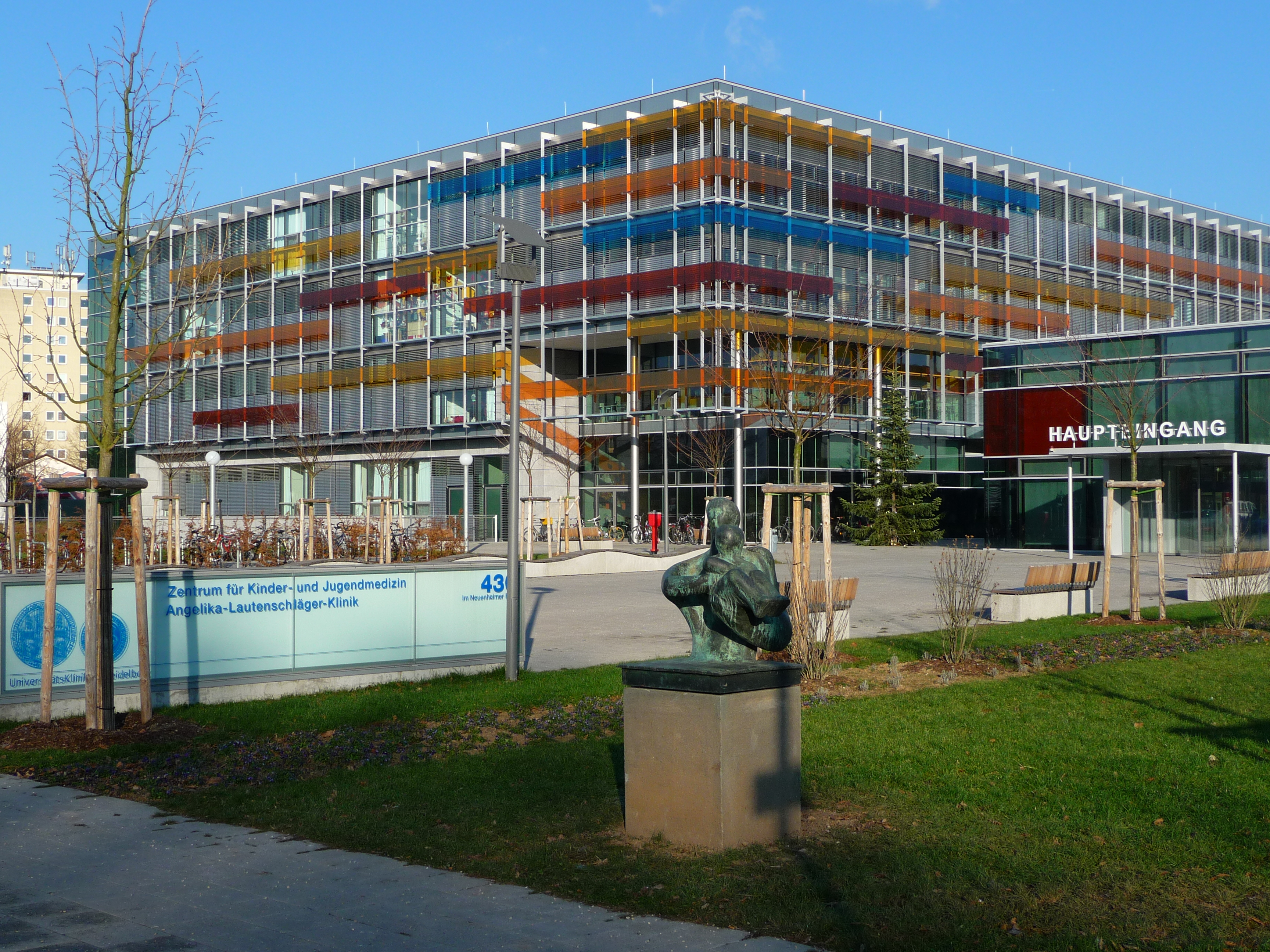 Heidelberg: Zentrum für Kinder- und Jugendmedizin, Angelika-Lautenschläger-Klinik, benannt nach der Ehefrau des Stifters / gehört zum Universitätsklinikum Heidelberg